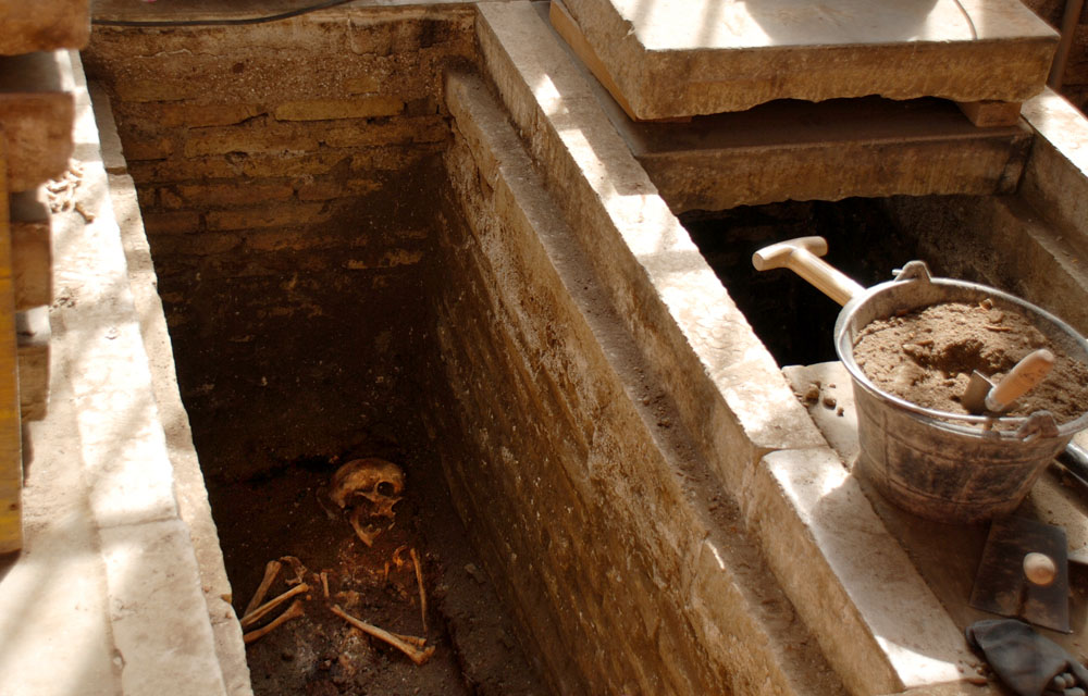 Tumba del claustro de la catedral de Santa María la Real de Pamplona.